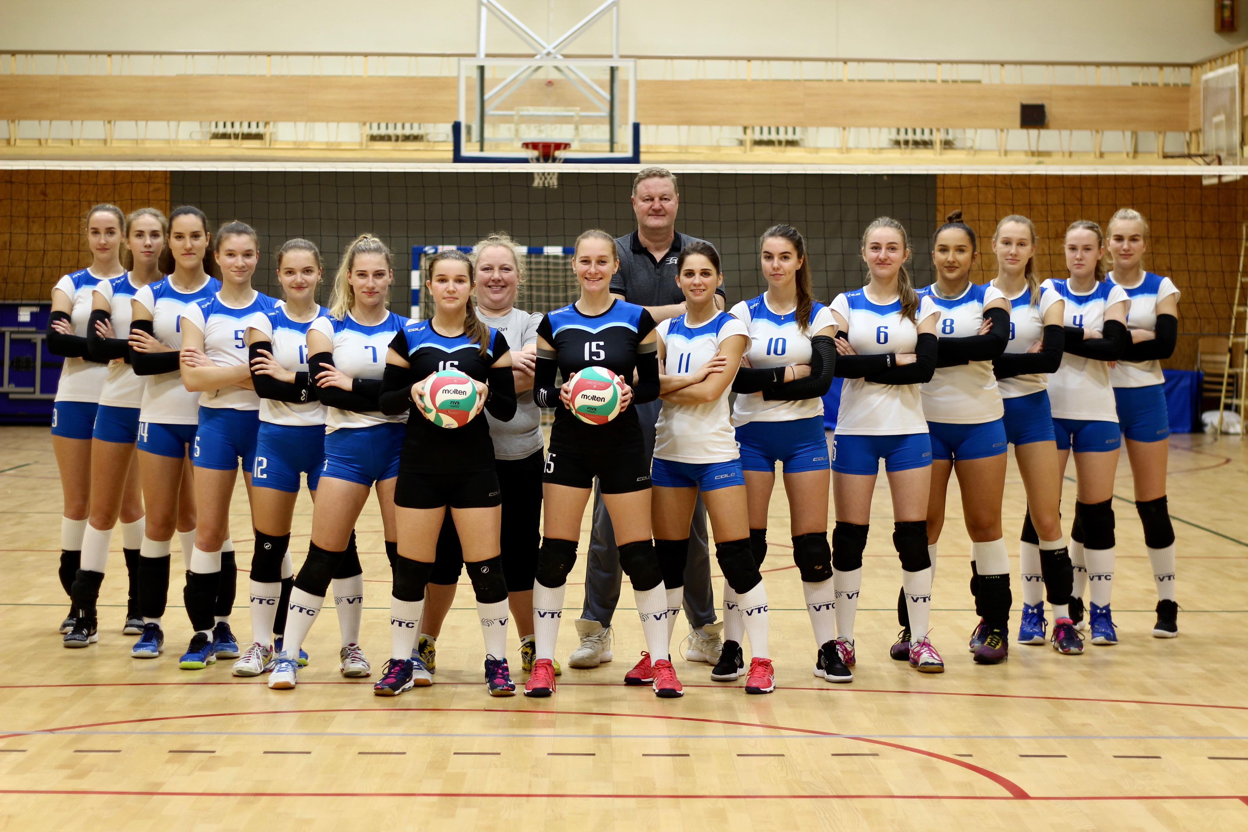 2019-2020 metų komandos sudėtis